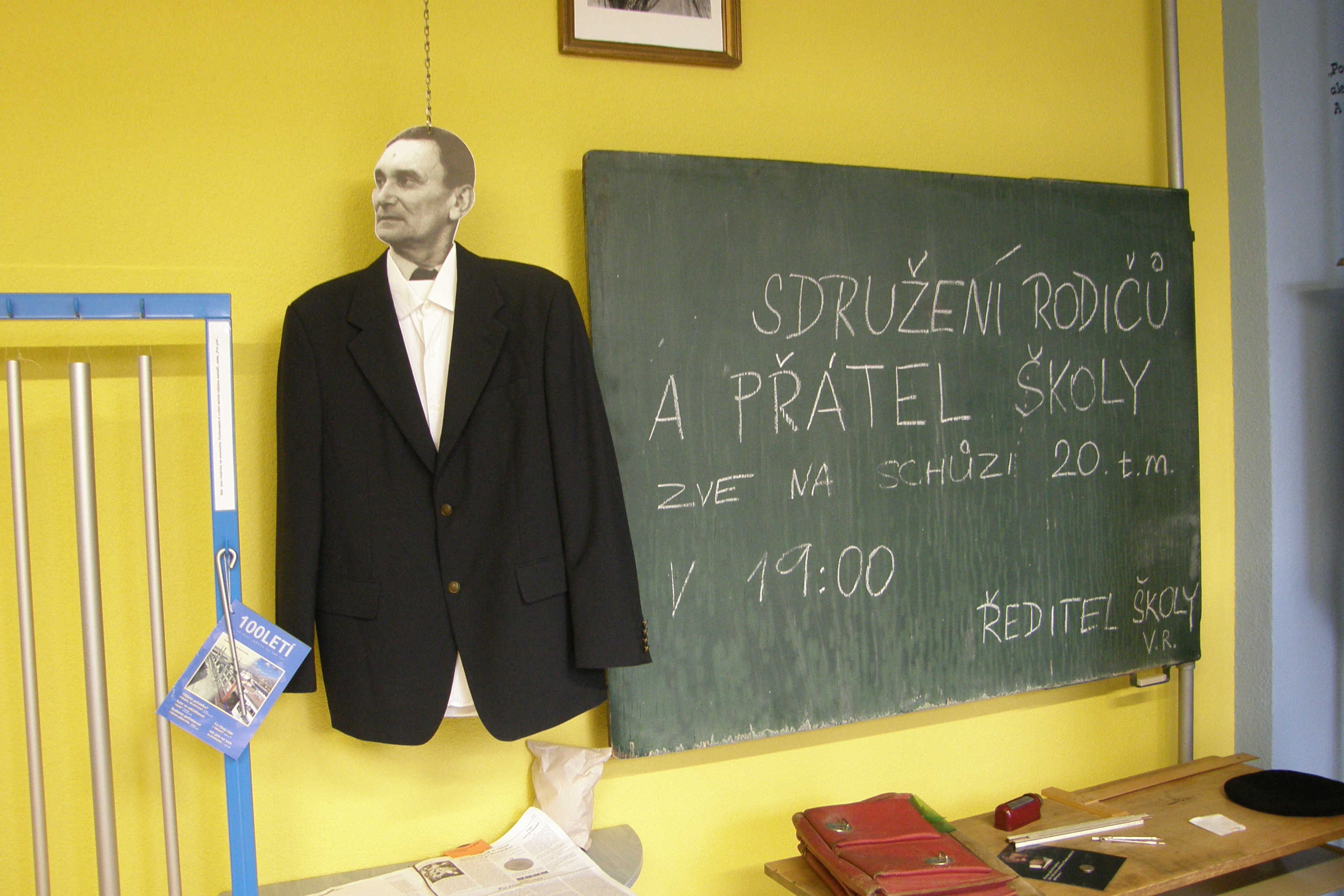 Muzeum HLINÍKárium v Humpolci